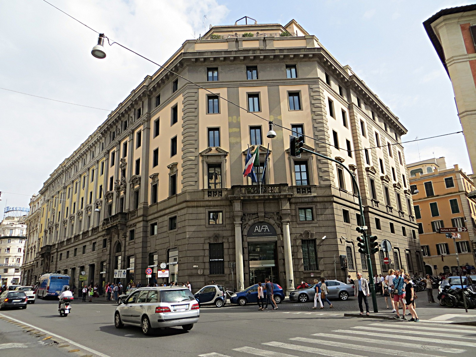 Via del Tritone